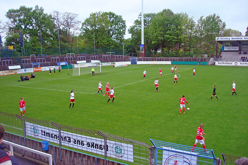 Heimspiel des FSV Gütersloh 2009 im Heidewaldstadion Gütersloh